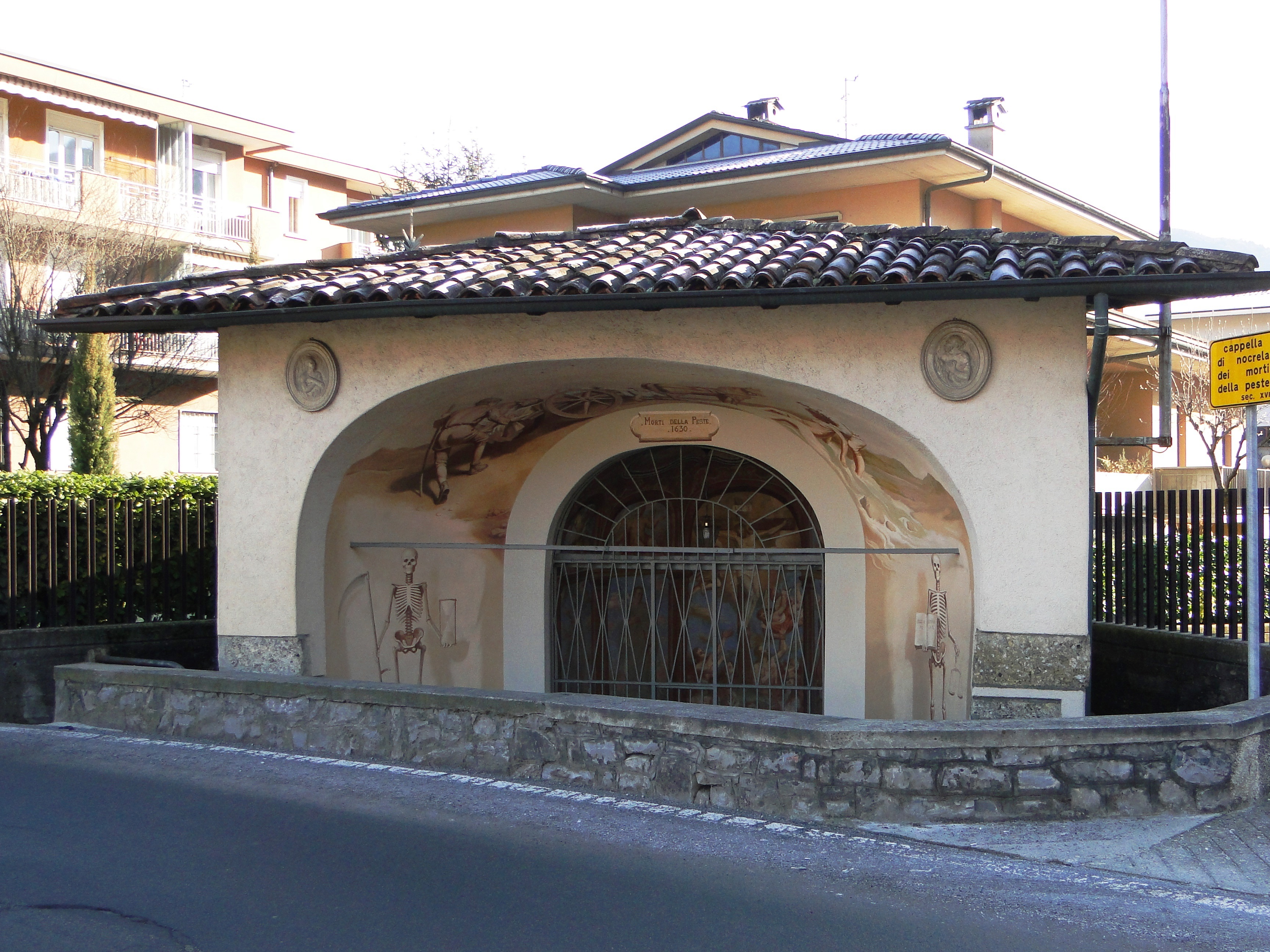 Cappelletta dei morti, loc. Nocrèla. Leffe (BG). Italy